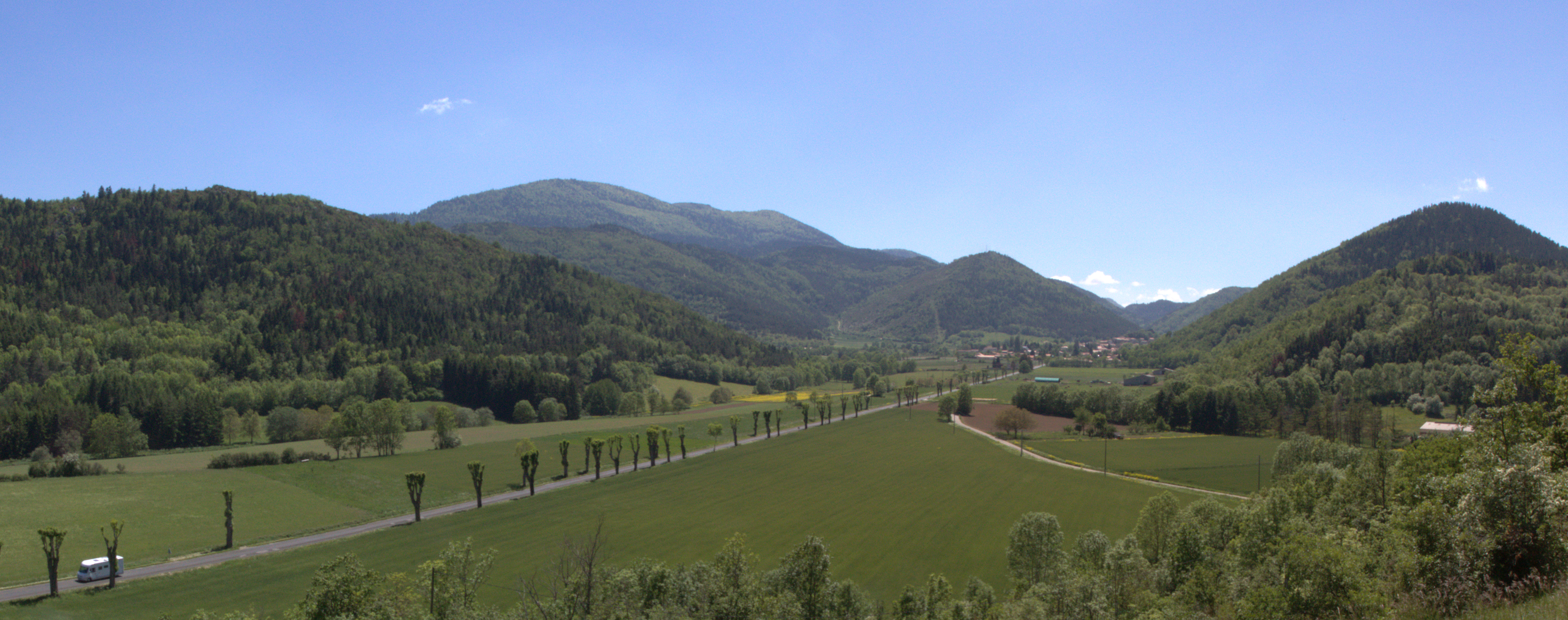 Village de Belcaire situé au Pays de Sault dans l'Aude